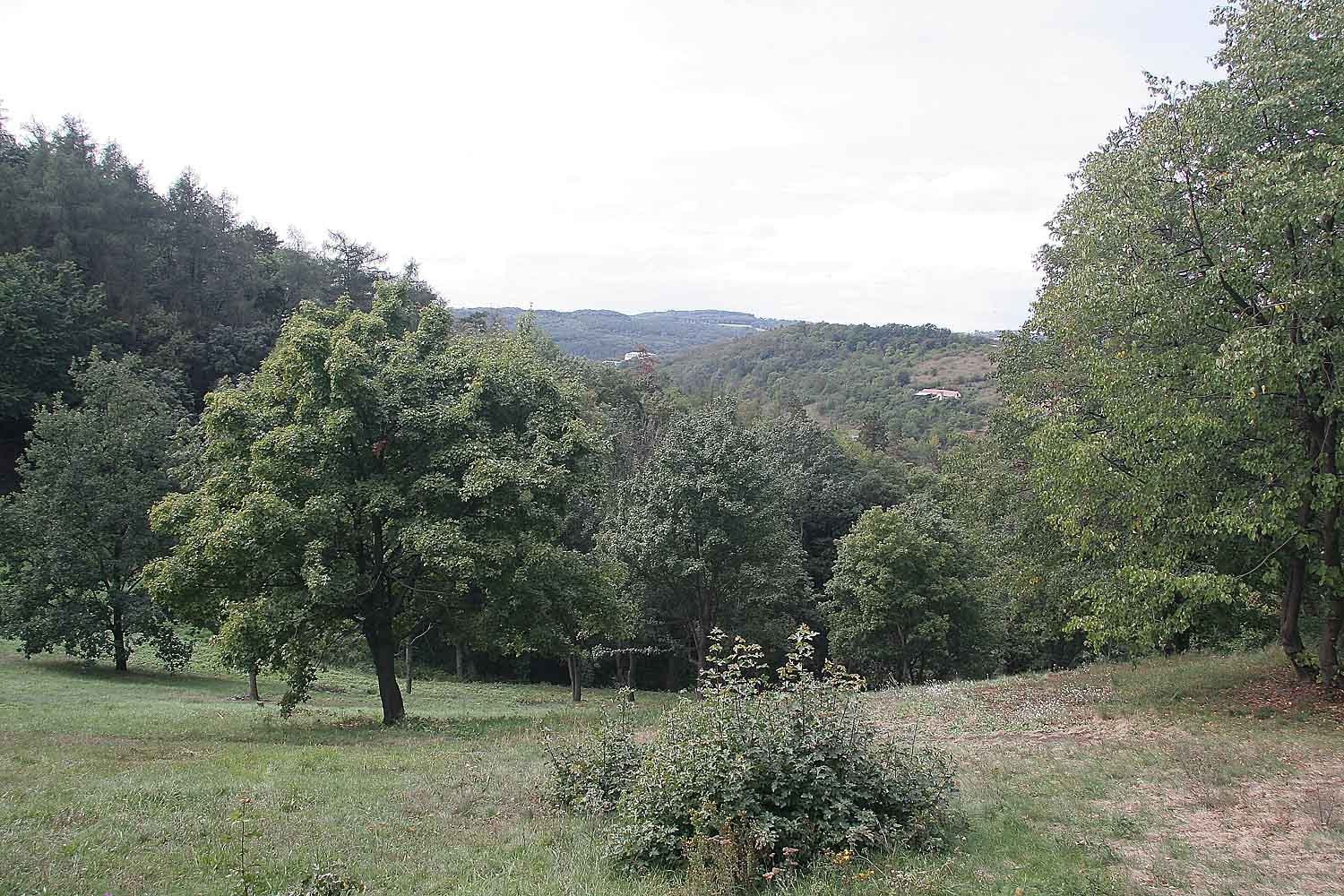 Přírodní památka Zlatnice v Praze 6 - Dejvicích, Czech Republic autor:Prazak date:1. 9. 2006